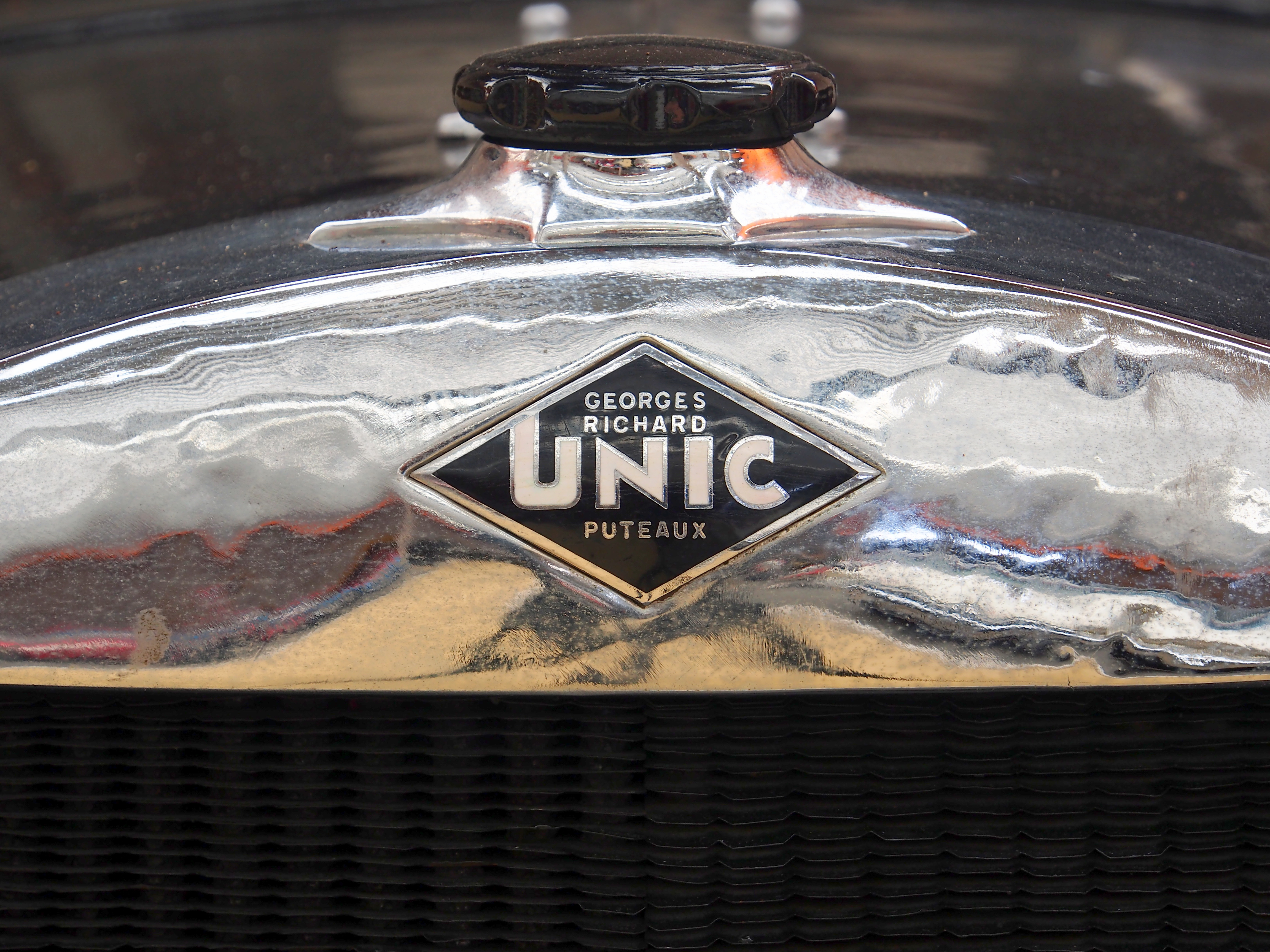 Photographed at the Association Lorraine des Amateurs d'Automobiles de collection et de loisirs.